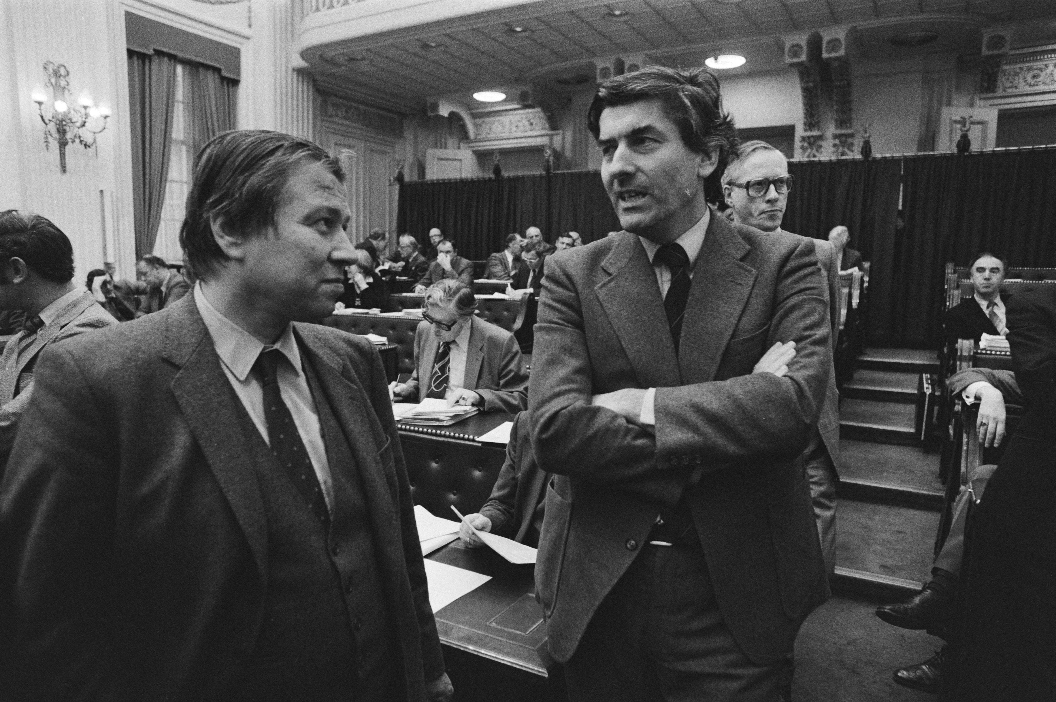 Collectie / Archief : Fotocollectie Anefo Reportage / Serie : Behandeling van de leegstandswet in de Tweede Kamer Beschrijving : Vooraan v.l.n.r. Marcel van Dam in gesprek met Ruud Lubbers Datum : 20 januari 1981 Locatie : Binnenhof, Den Haag, Zuid-Holland Trefwoorden : gesprekken, parlementaire debatten, parlementariërs, parlementen, parlementsgebouwen, vergaderingen Persoonsnaam : Dam, Marcel van, Lubbers, Ruud Instellingsnaam : Tweede Kamer Fotograaf : Croes, Rob C. / Anefo, [onbekend] Auteursrechthebbende : Nationaal Archief Materiaalsoort : Negatief (zwart/wit) Nummer archiefinventaris : bekijk toegang 2.24.01.05 Bestanddeelnummer : 931-2755